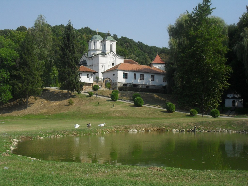 Српски (ћирилица): Манастир Каона, Епархија шабачка, Србија